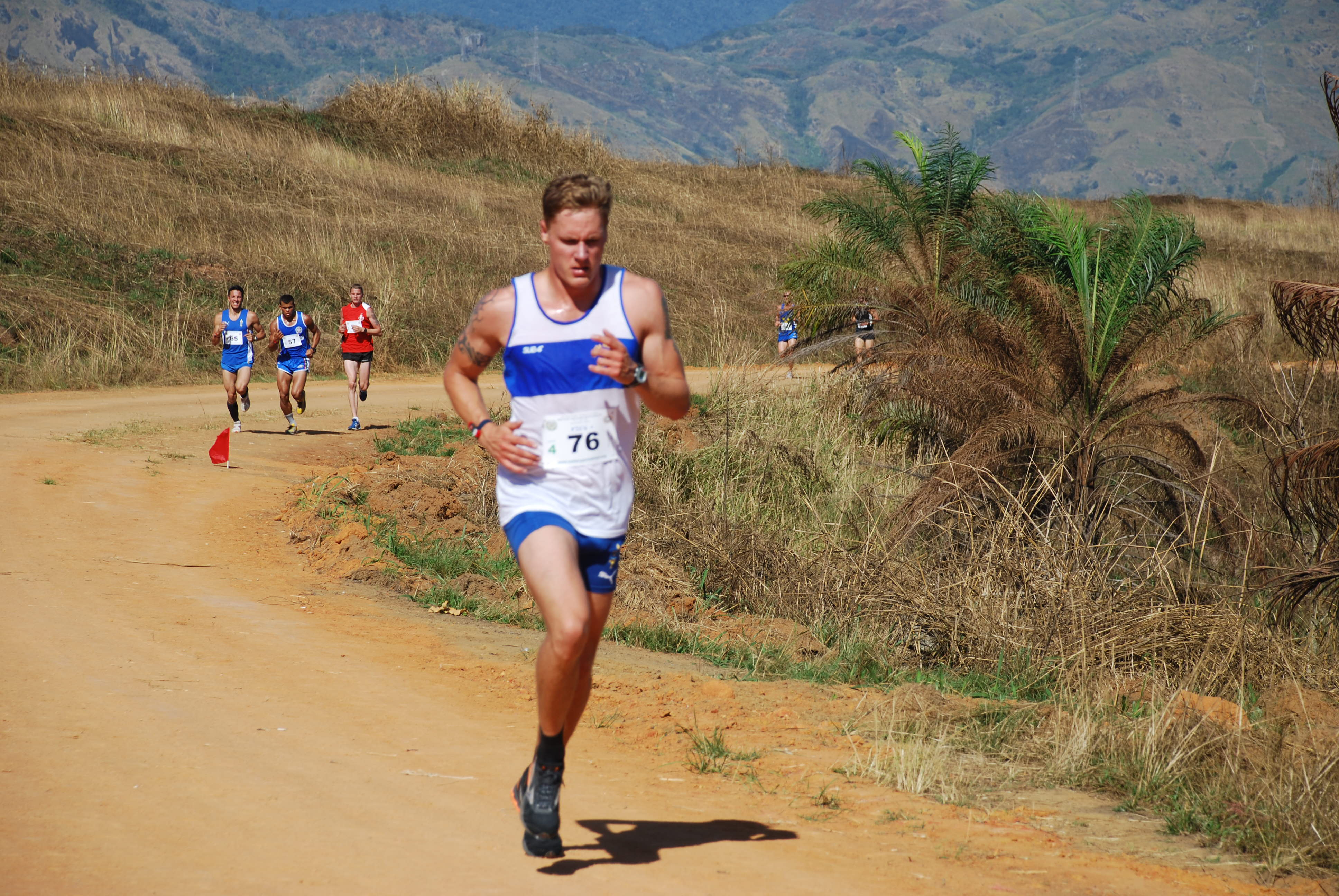 Terränglöpningsmomentet i militär femkamp